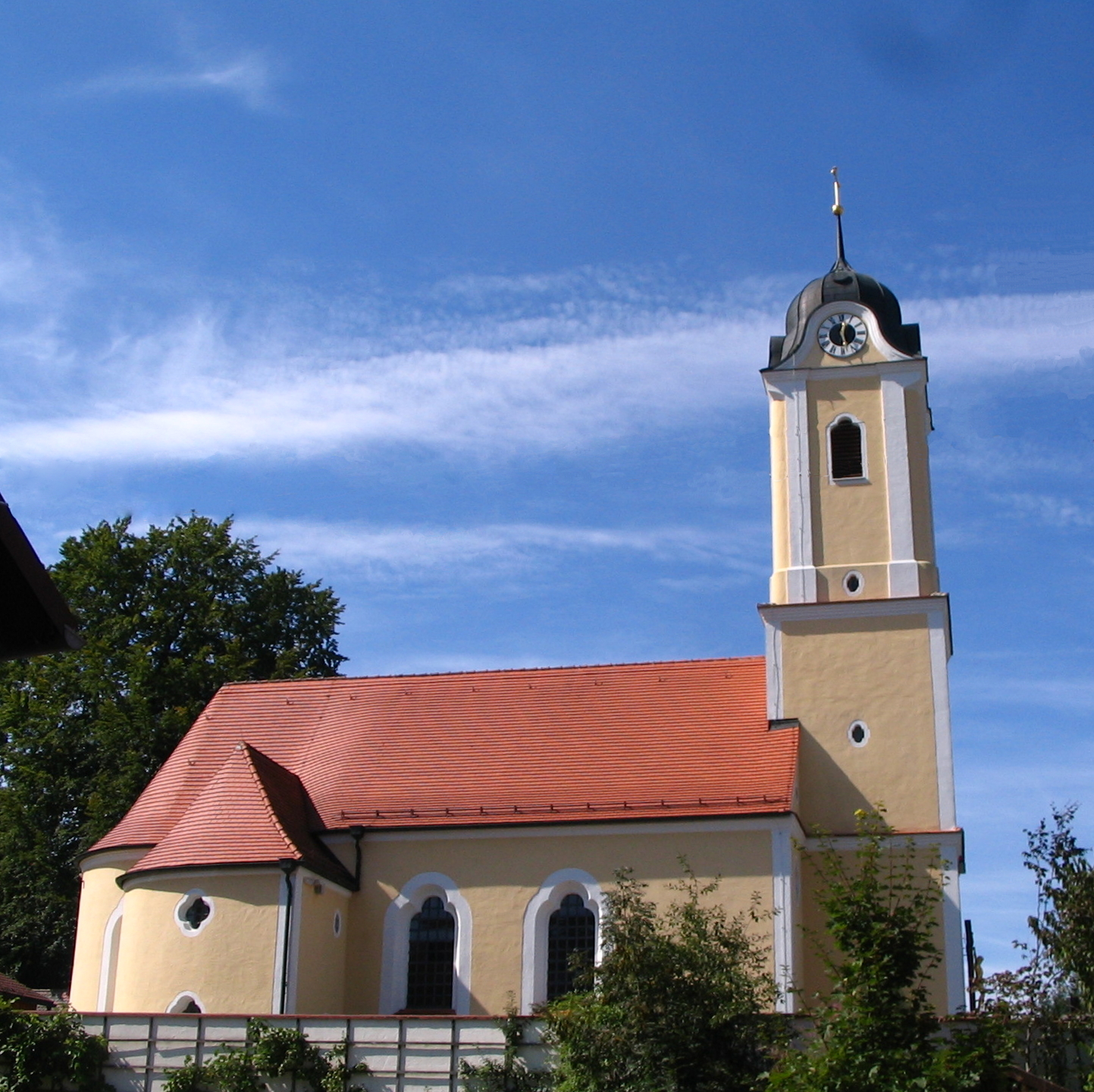 St Nikolaus in Attenhofen, Landkreis Kelheim, Niederbayern